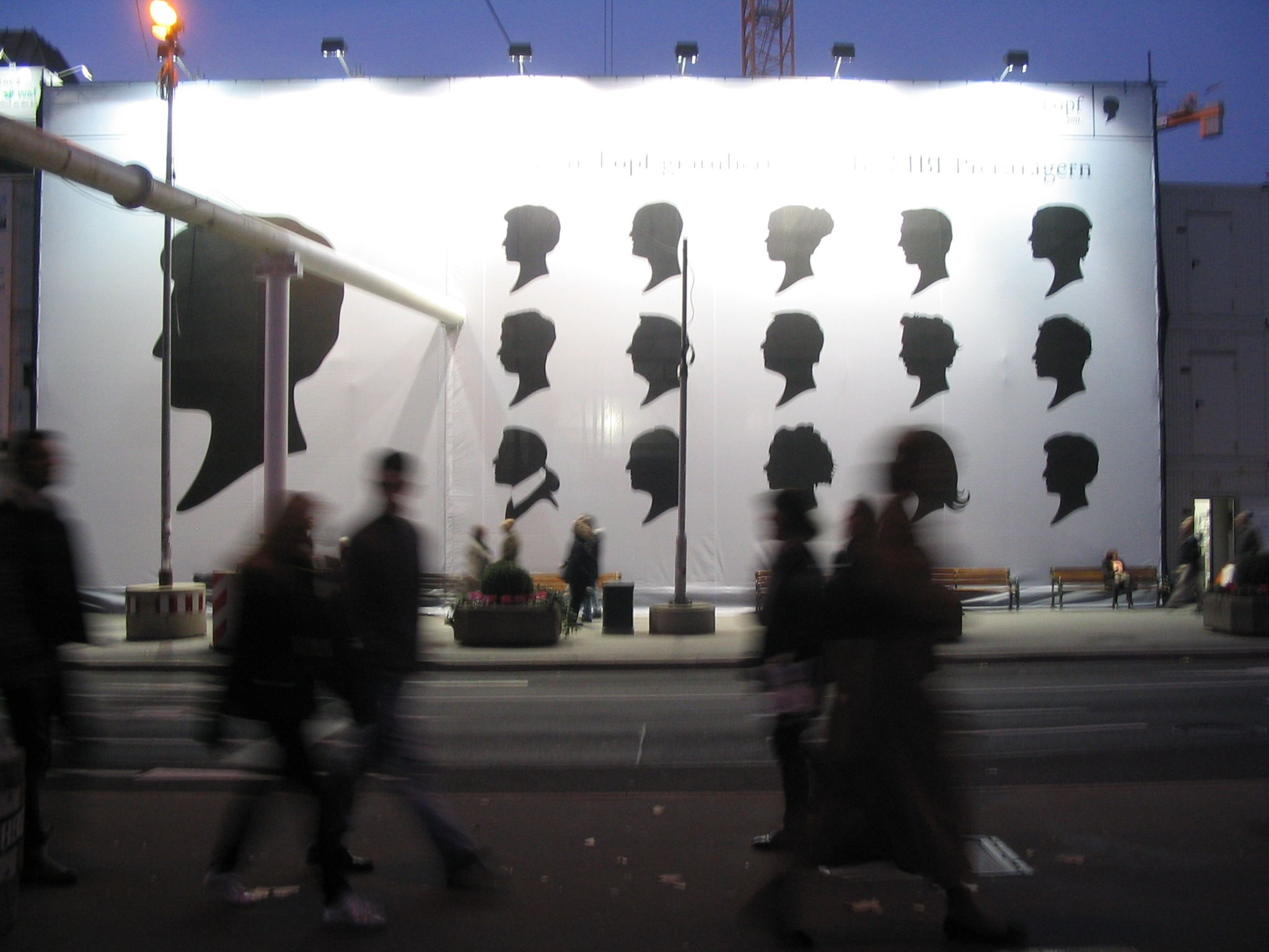 Werbung der Firma Schwarzkopf am Nordende der Düsseldorfer Königsallee anlässlich der Bambi-Verleihung. Die Verleihung durch den Burda-Verlag findet am 22. November in der Düsseldorfer Stadthalle statt (Quelle: Homepage der Stadt Düsseldorf). Blickrichtung Norden.